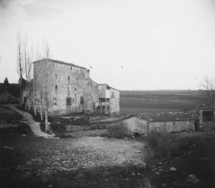 Castell de Castellnou a Moià. Josep Salvany i Blanch (1924)